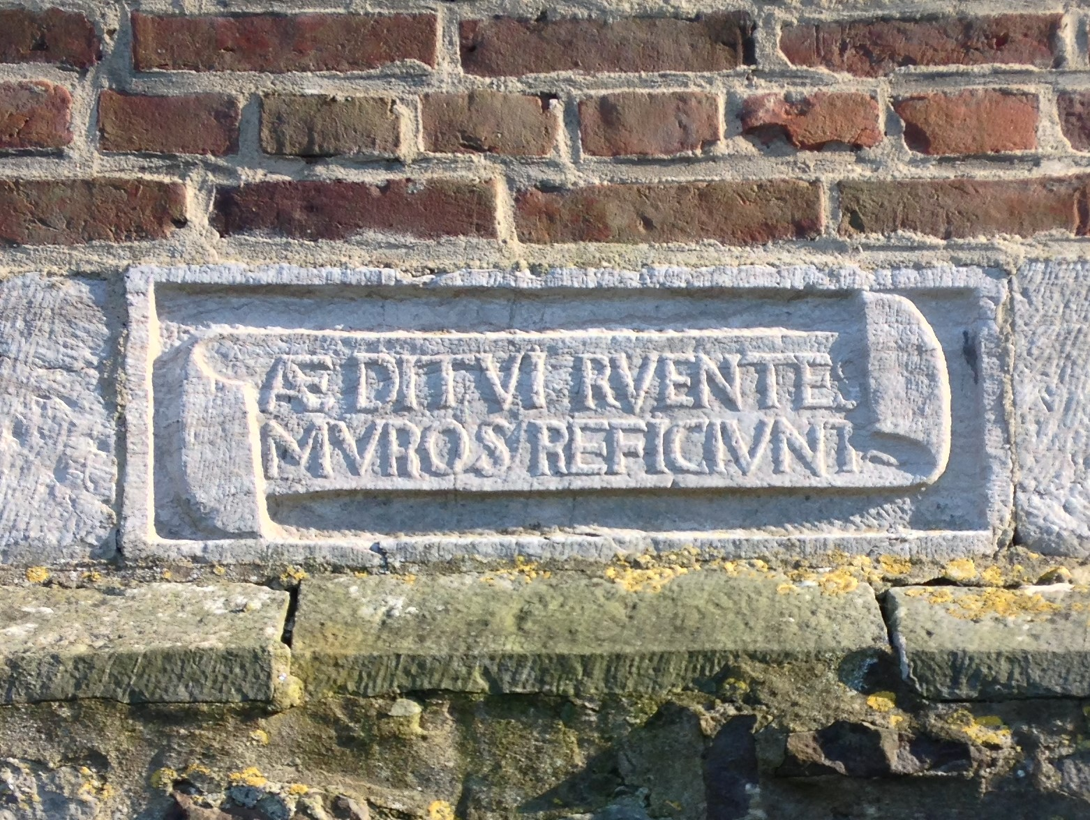 Pierre avec l'inscription "AE DITVI RVENTE MVRUS REFICIVNT" sur l'arrière de l’Église Notre Dame de la Visitation de Nalinnes-Centre